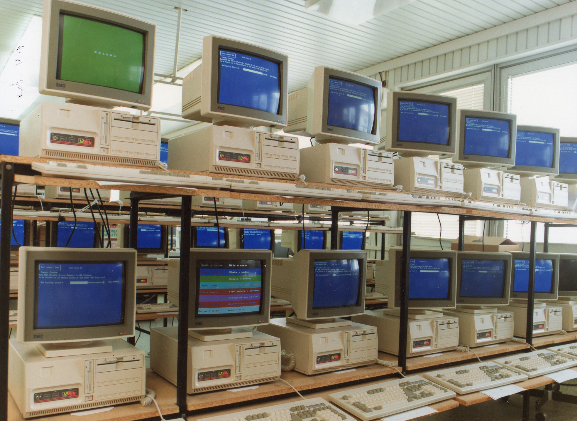 Slušovické počítače - foto. Poskytl majitel společnosti JZD Agrokombinát Slušovice František Čuba.